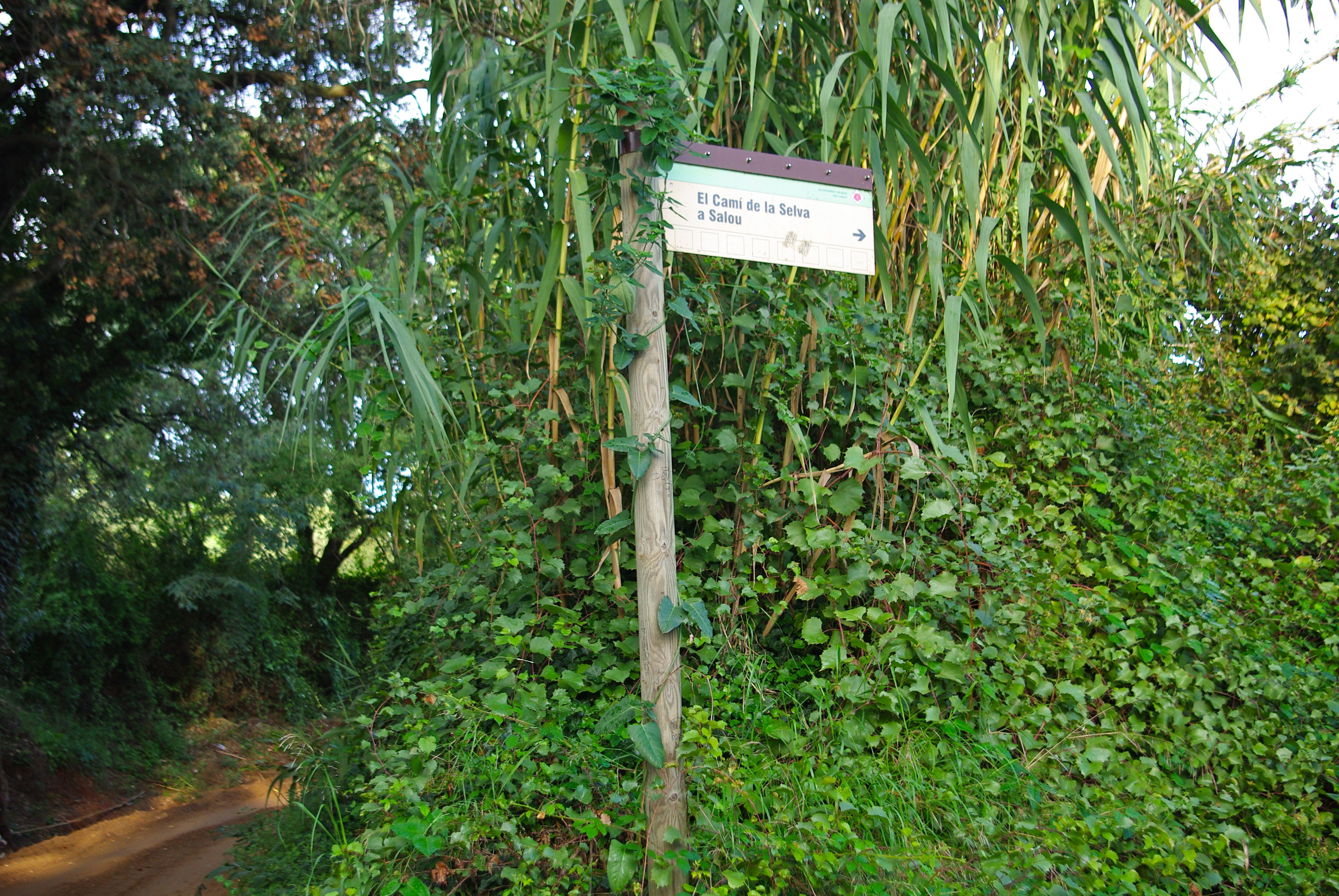 Indicador del camí de la Selva a Salou, vora el barranc de les Alzines